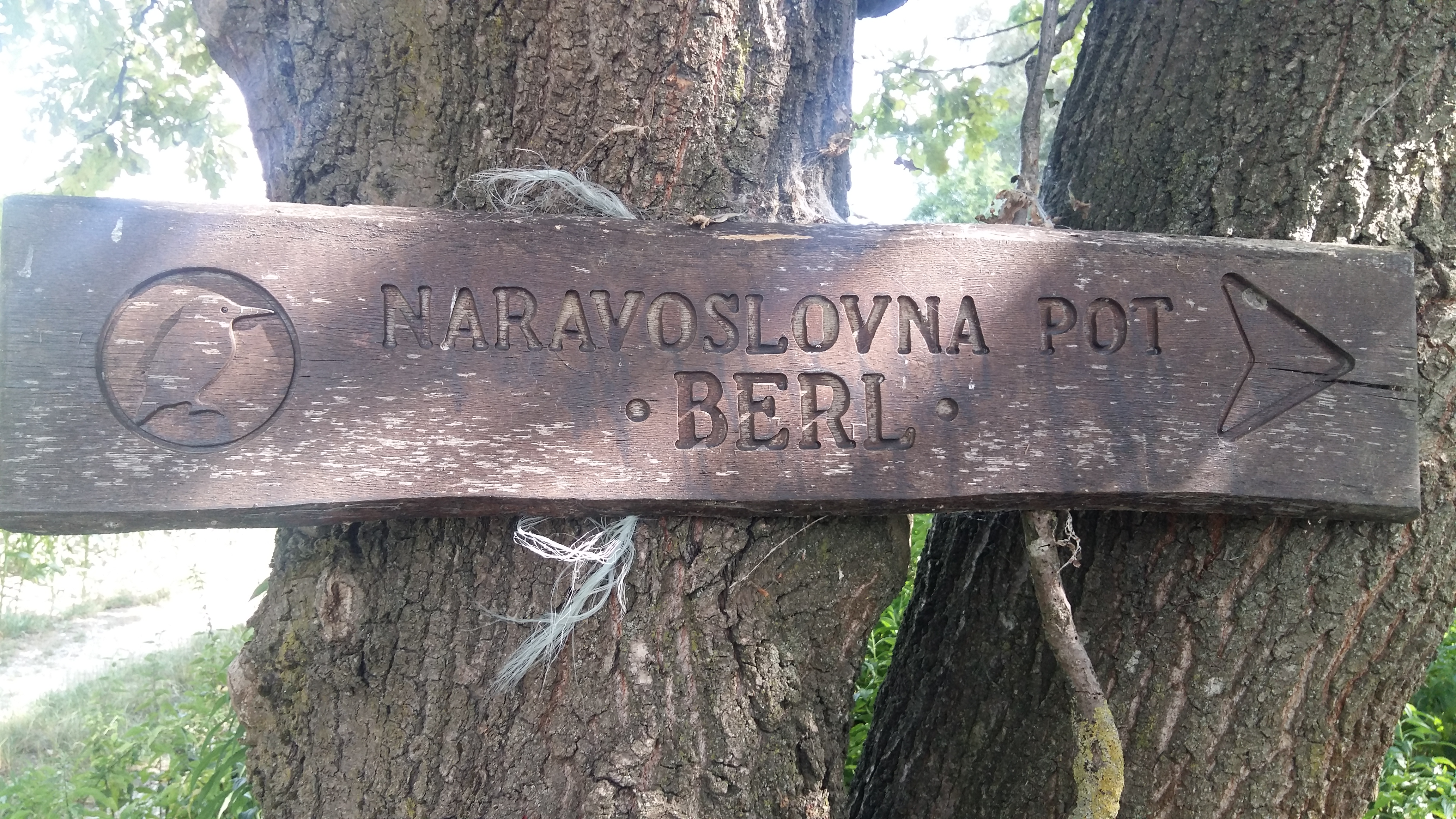 Tabla